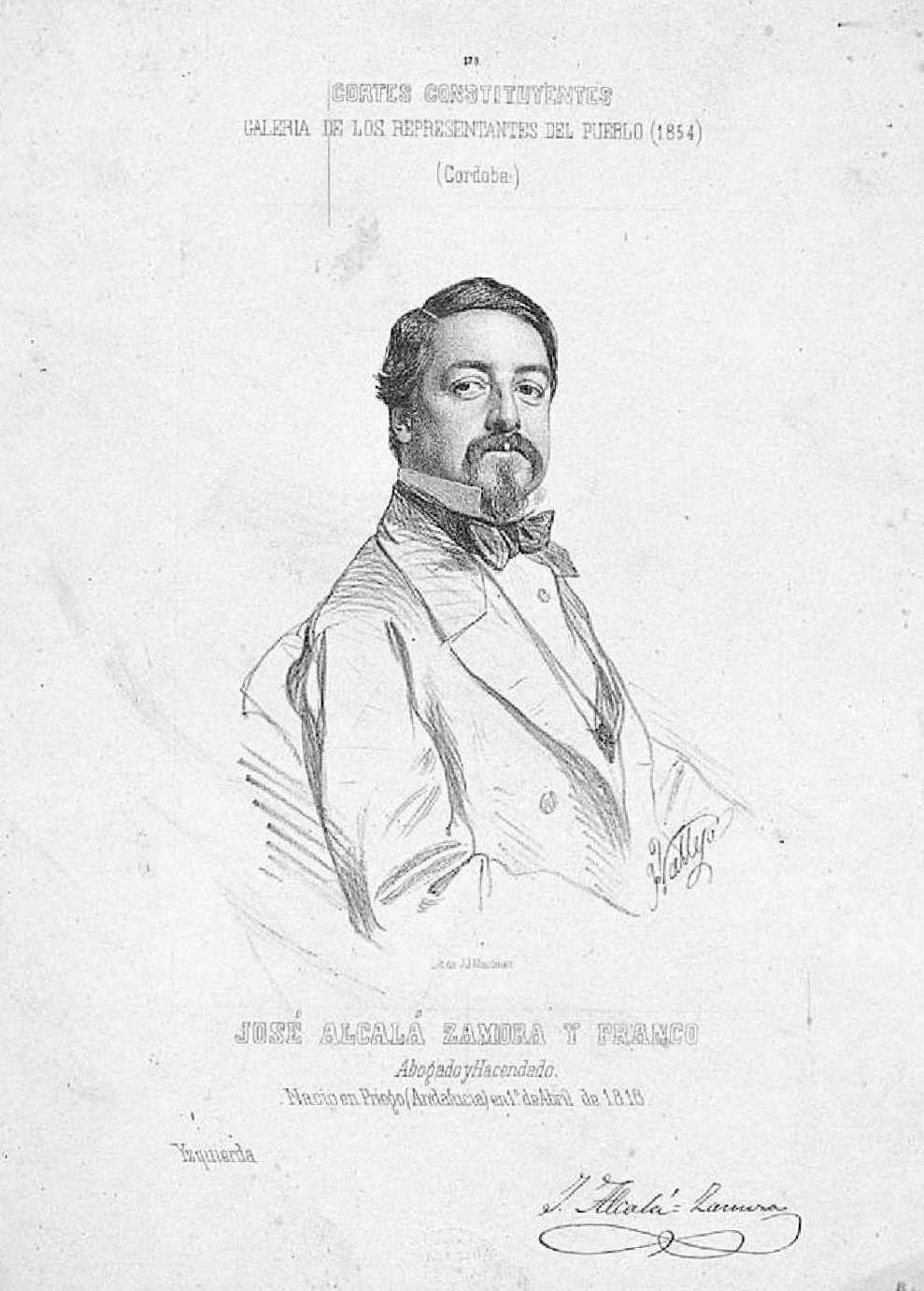 Retrato de José Alcalá Zamora y Franco, litografía de José Vallejo Galeazo para la serie de retratos de diputados: Cortes constituyentes: galería de los representantes del pueblo. Biblioteca Nacional de España